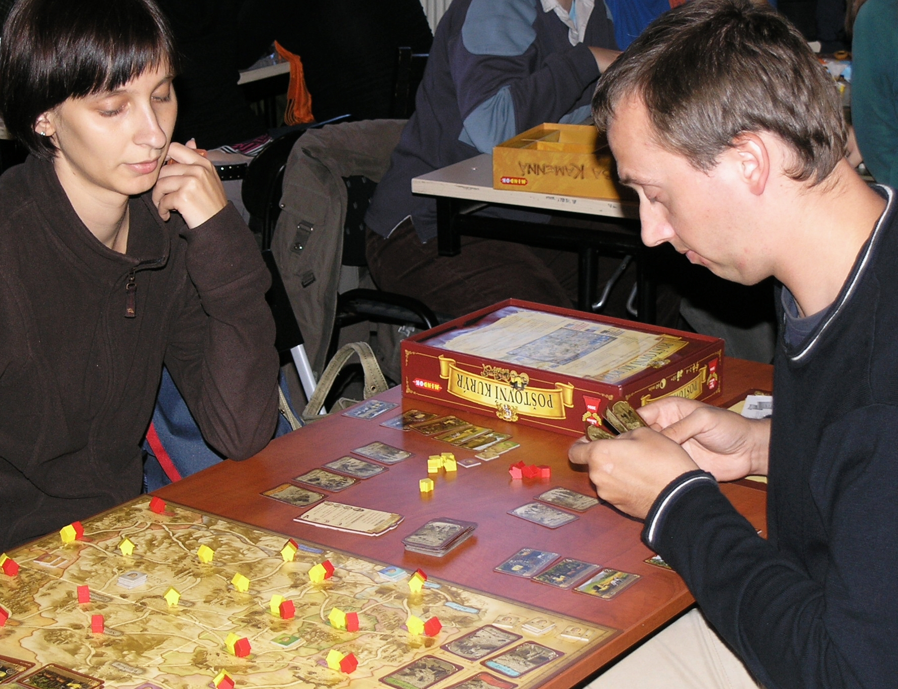 Deskohraní 2008